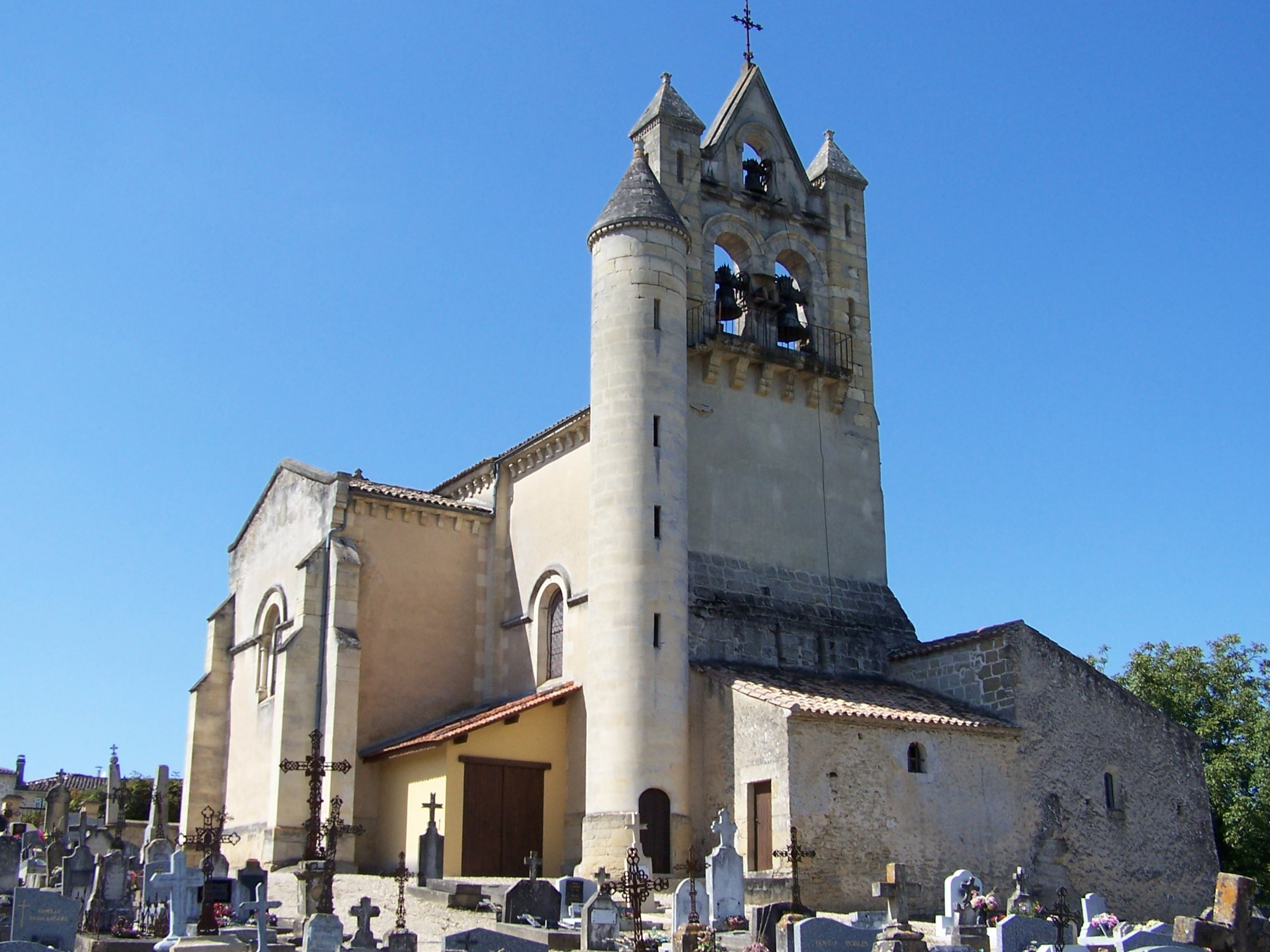 Chevet de l'église de Bieujac, Gironde, France